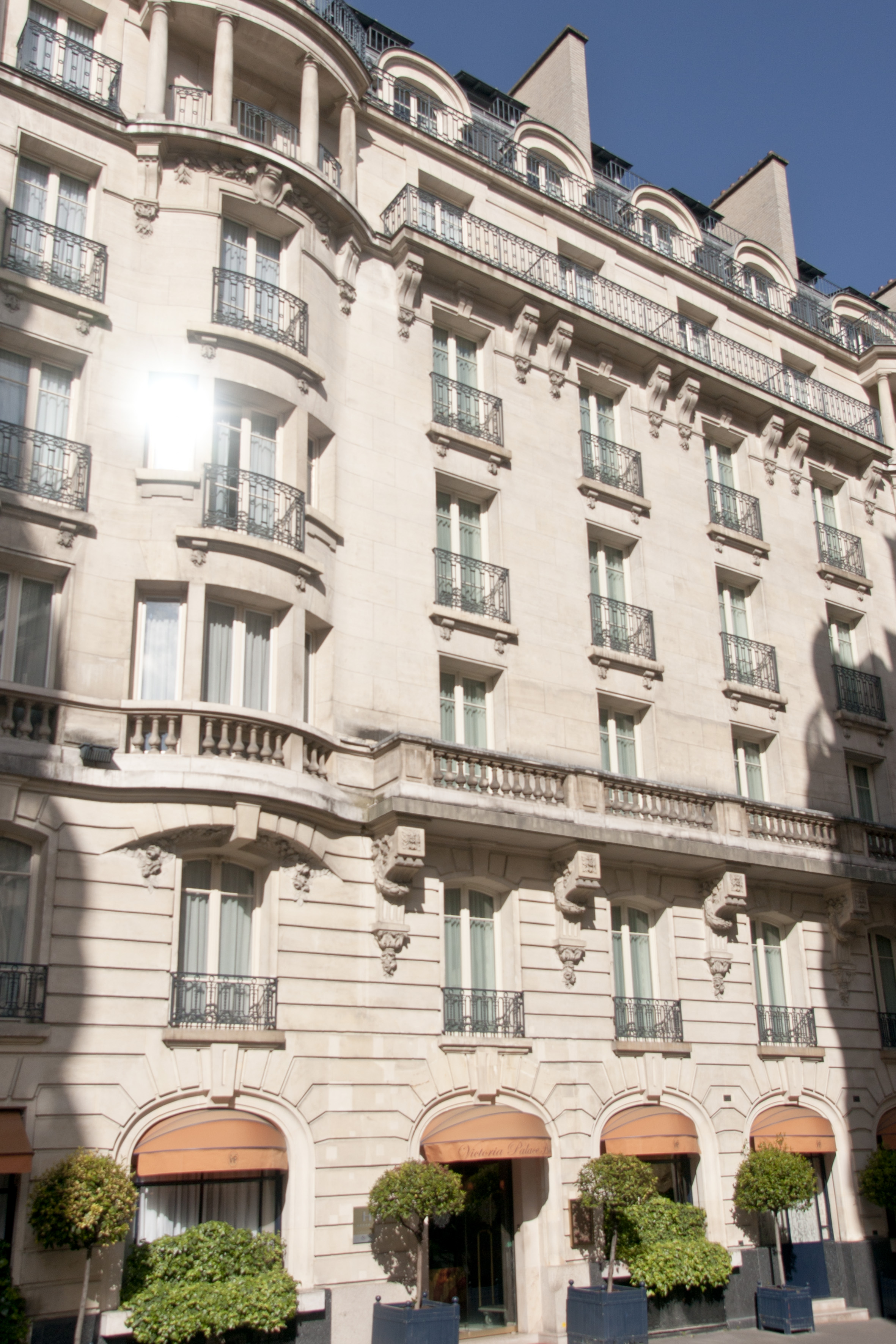 Façade sur rue du Victoria Palace Hôtel